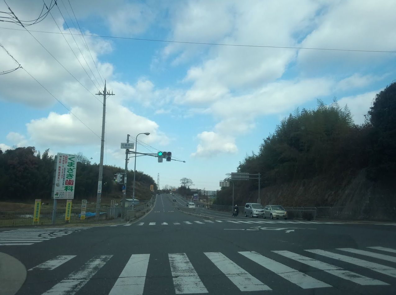 国道309号 富田林バイパス （大阪府南河内郡河南町内）